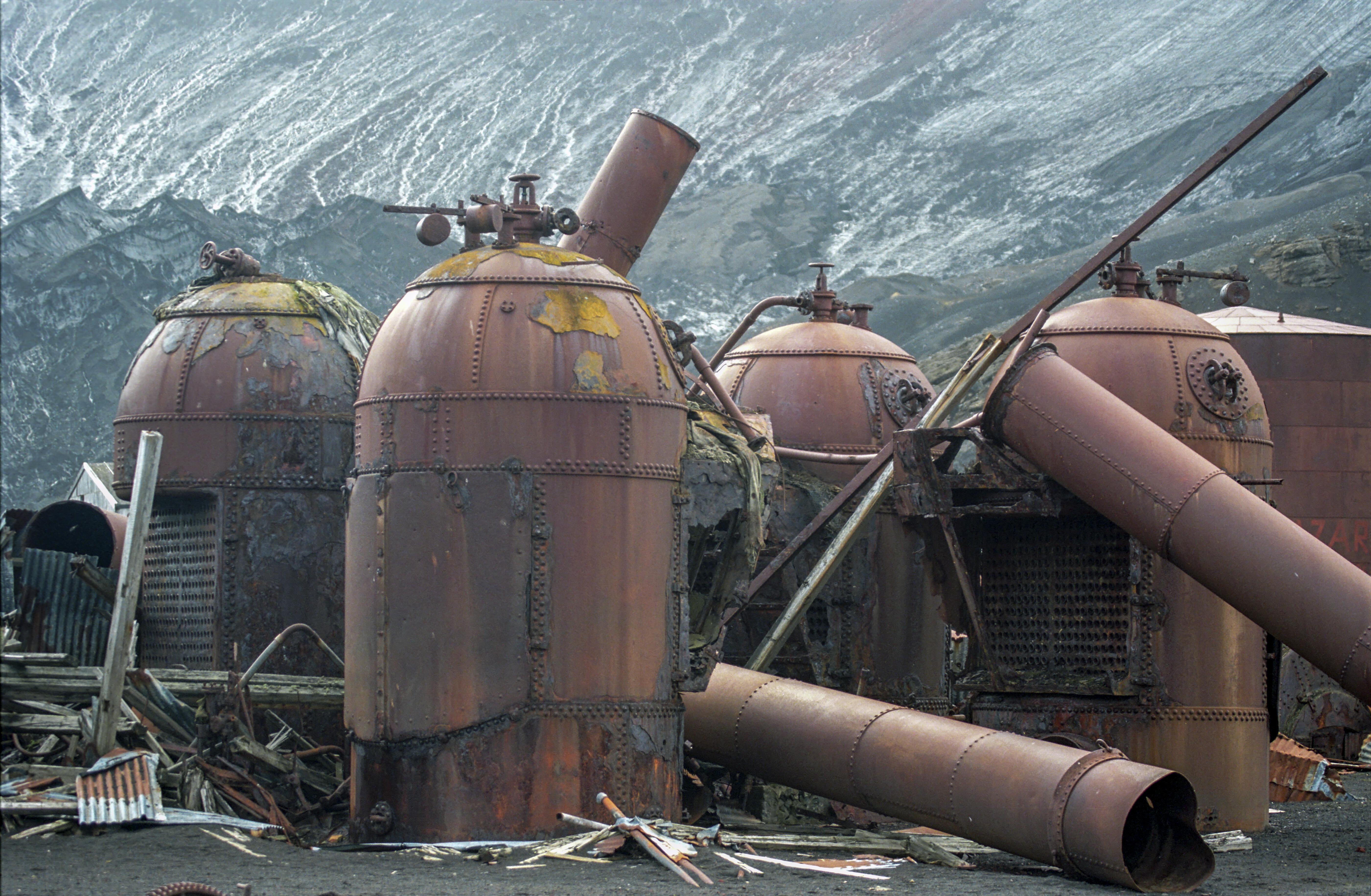 Antarctic